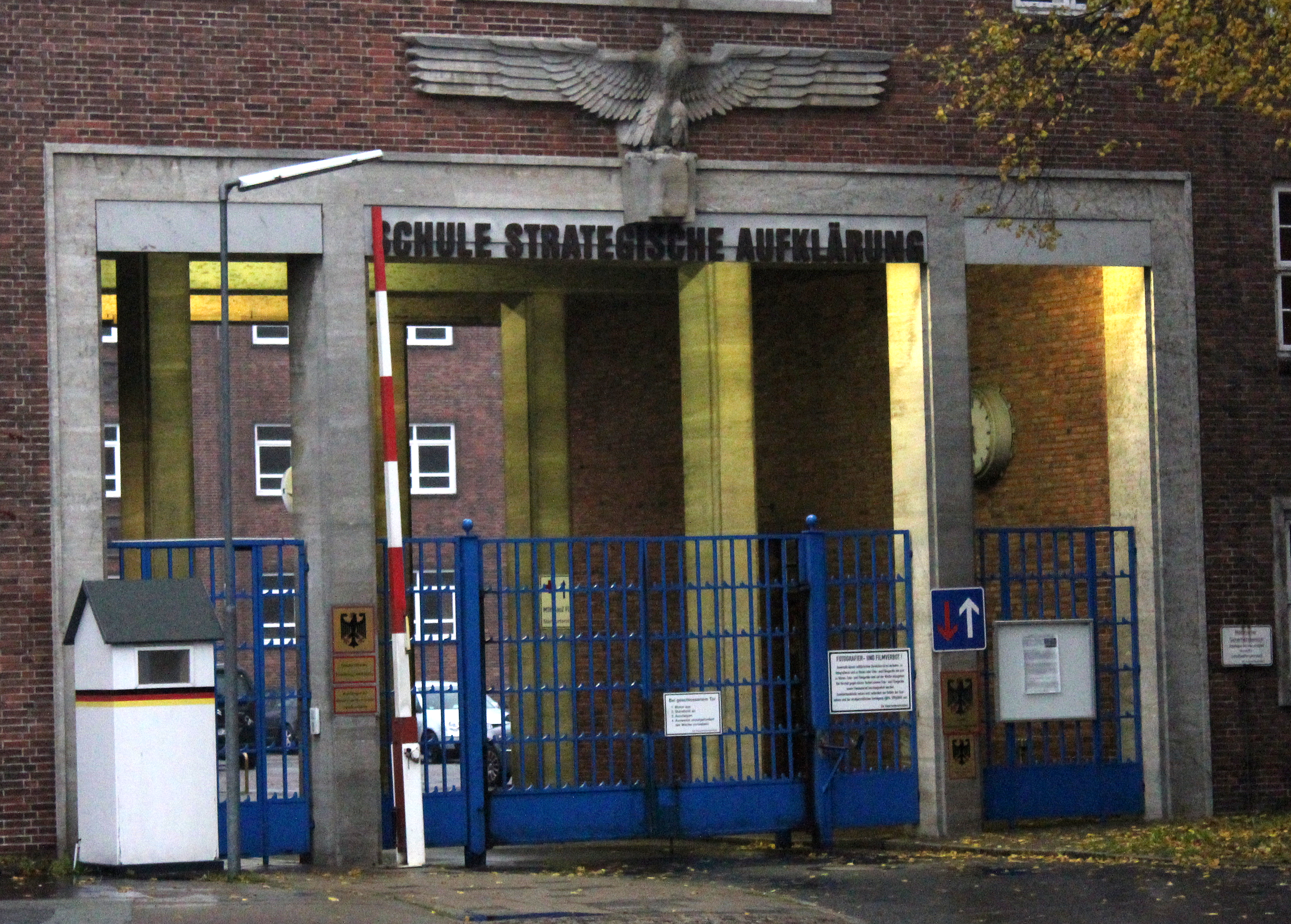 Portal der Schule für Strategische Aufklärung in Flensburg-Mürwik (2011), früher Marine-Nachrichtenschule, dann Marinefernmeldeschule